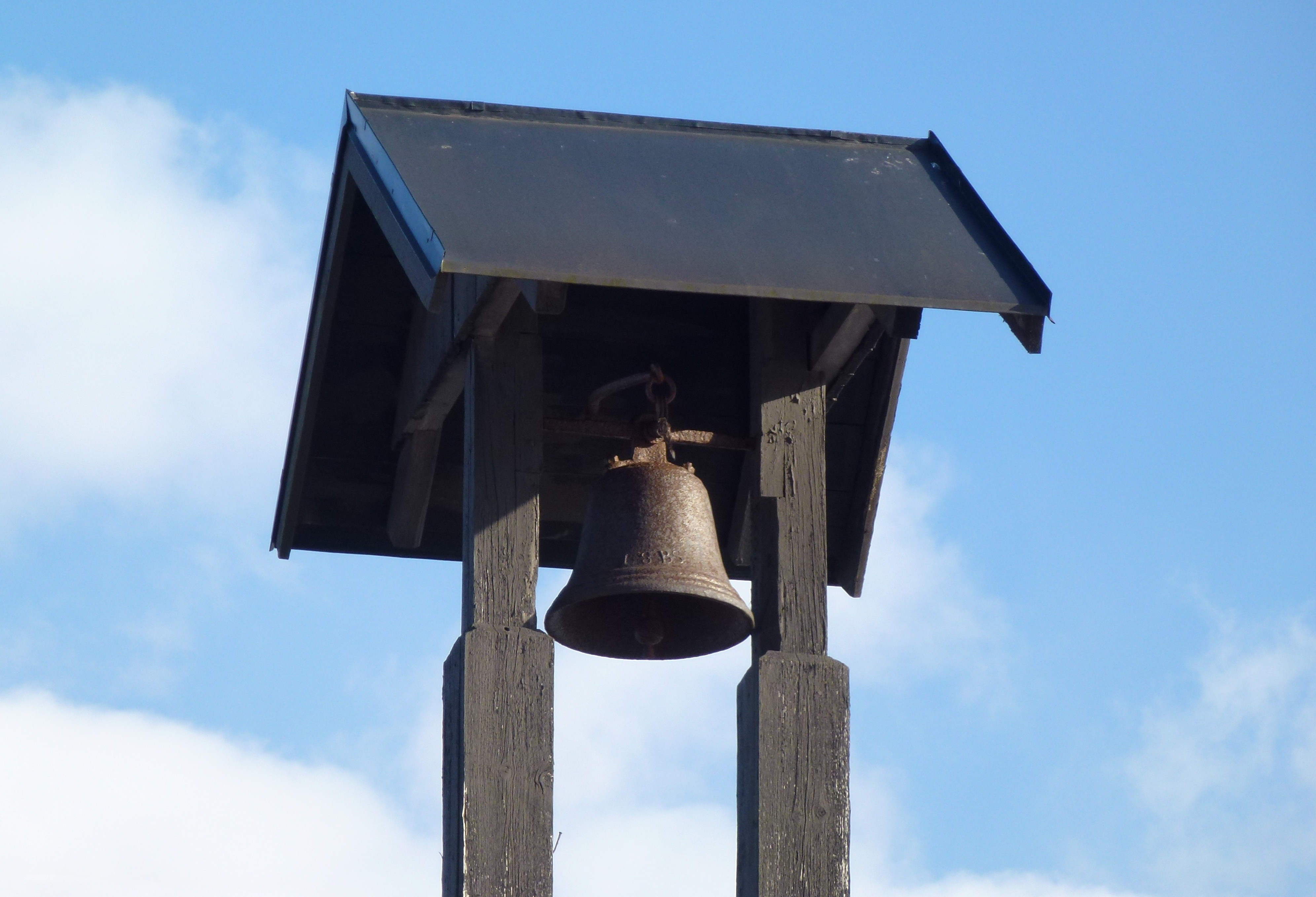 Ladviks gårds vällingklocka